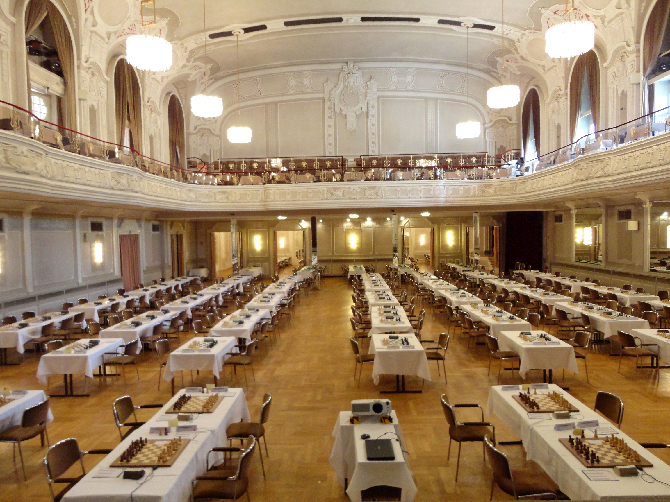 Kursaal in Bad Neuenahr